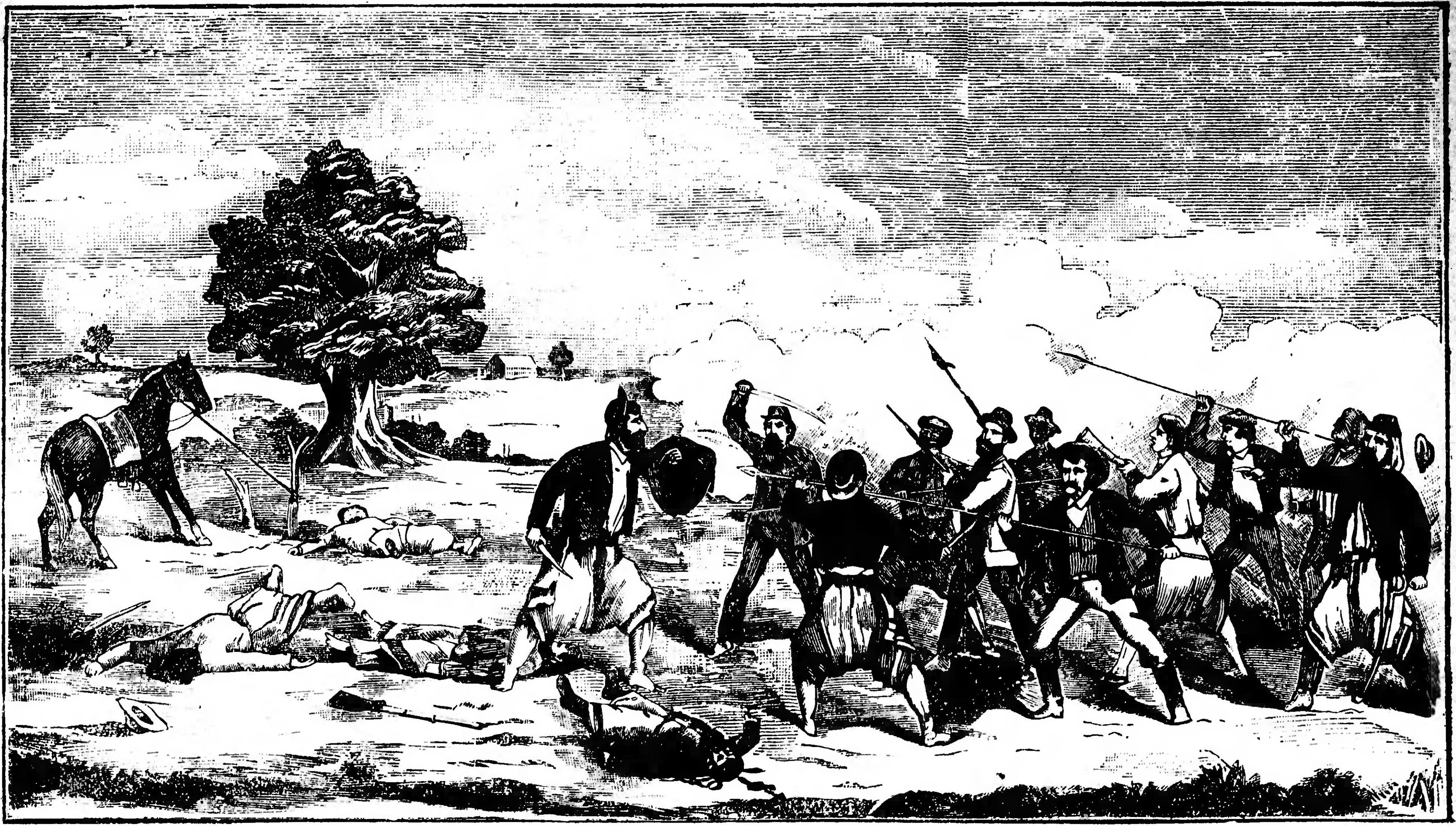 Tal vez en el corazon - lo tocó un Santo bendito - á un gaucho que pegó el grito, y dijo: «Cruz, no consiente - que se cometa el delito de matar ansi un valiente...